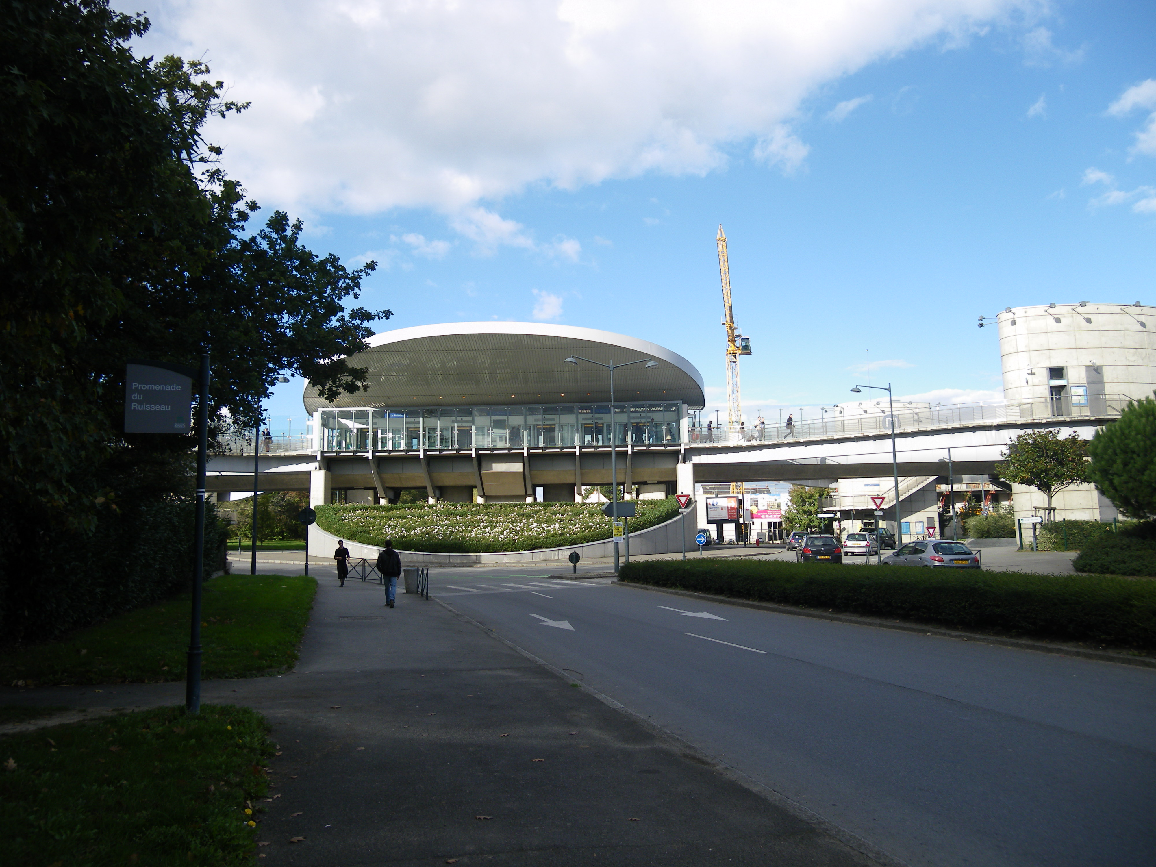 la station de metro poterie